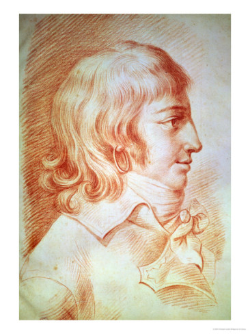 Кристоф Герен. Портрет Сен-Жюста. 1793 год, рисунок сангиной.